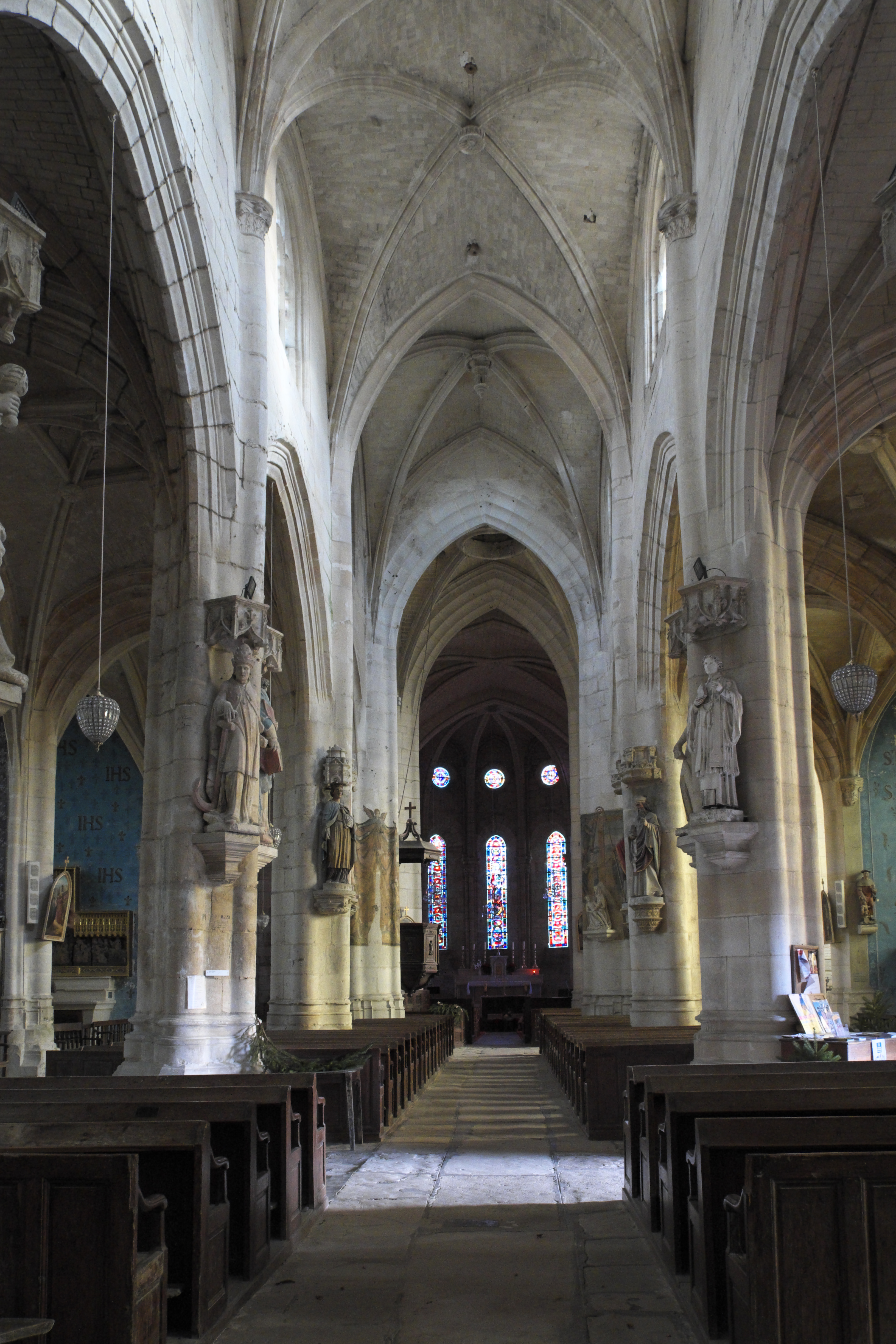 Katholische Pfarrkirche Notre-Dame in Vétheuil im Département Val-d’Oise in der Region Île-de-France (Frankreich), Innenraum